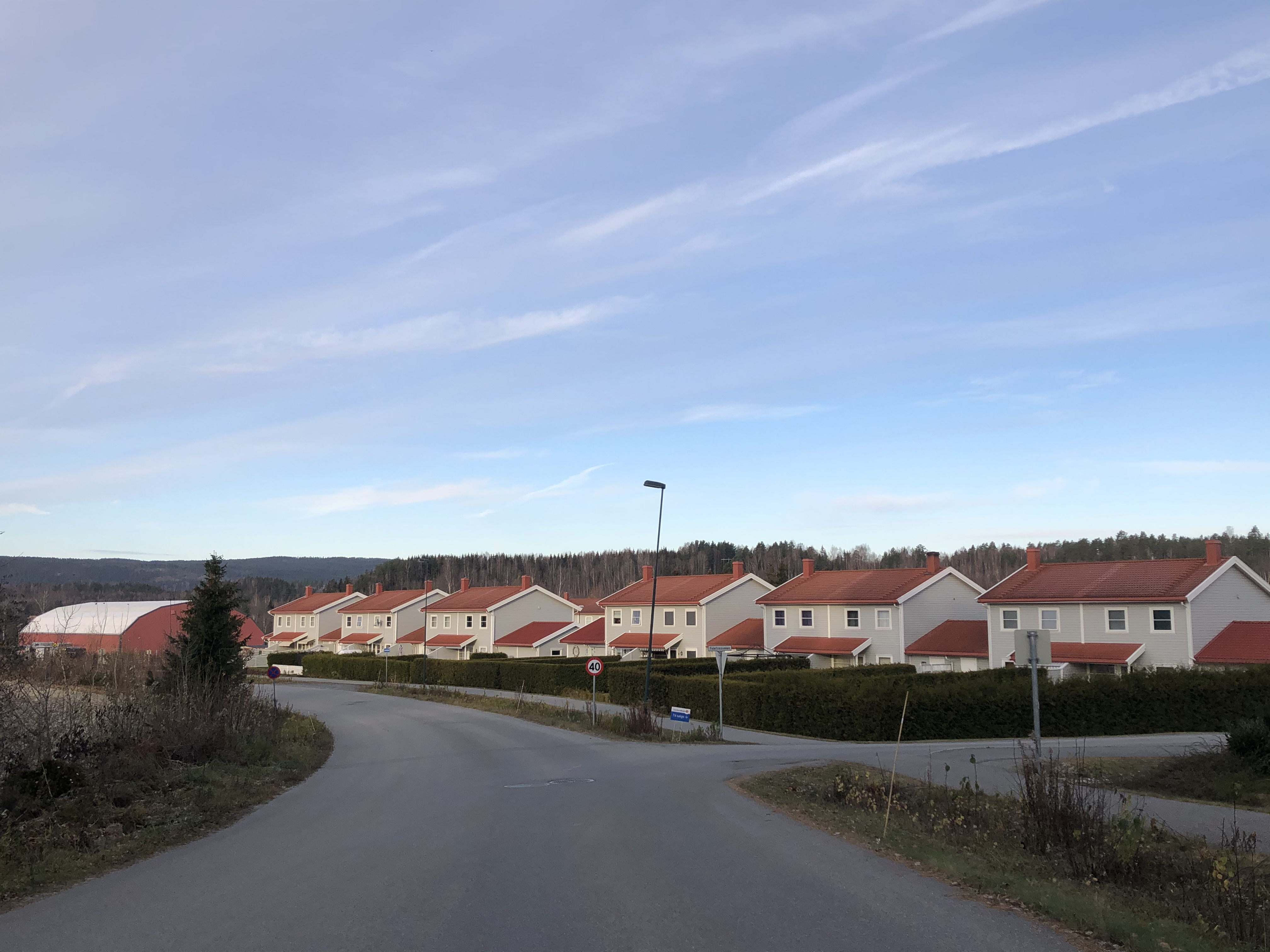 Monserudveien, Hønefoss